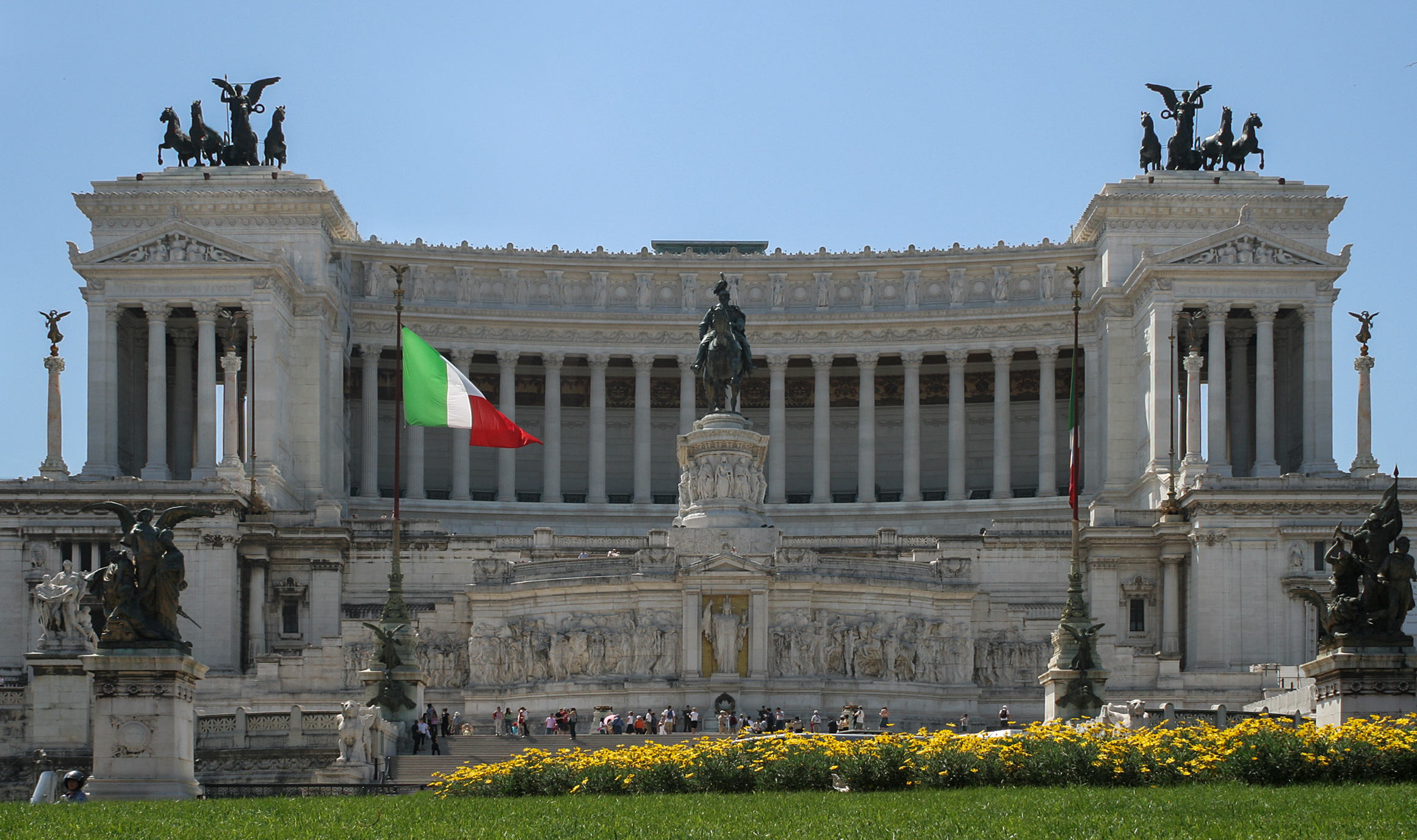 Das Monumento Nazionale a Vittorio Emanuele II (italienisch; deutsch Nationaldenkmal für Viktor Emanuel II., auch bekannt unter dem Namen Vittoriano) ist das Nationaldenkmal in Rom, das der italienischen Staatsgründungsbewegung im 19. Jahrhundert, dem Risorgimento (Museum im Monument), und dem ersten König des neugegründeten Königreichs Italien, Viktor Emanuel II. aus dem Haus Savoyen, gewidmet ist. Es liegt auf dem Kapitolshügel am Südende der Via del Corso zwischen der Piazza Venezia und dem Forum Romanum, neben dem Trajansforum. Es zählt heute zu den Staatssymbolen der Italienischen Republik. aus Wikipedia Roma / Italy